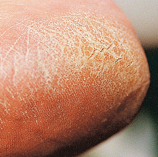 Schrunde mit kosmetischem Hintergrund. Das Bild zeigt eine raue, spröde Haut mit leichten Einrissen in der oberen Hornschicht.